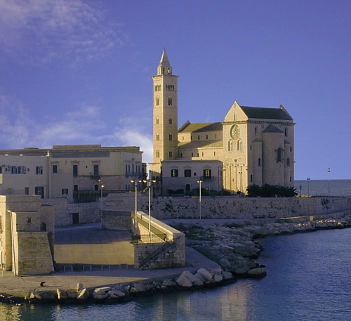 Cattedrale di Trani